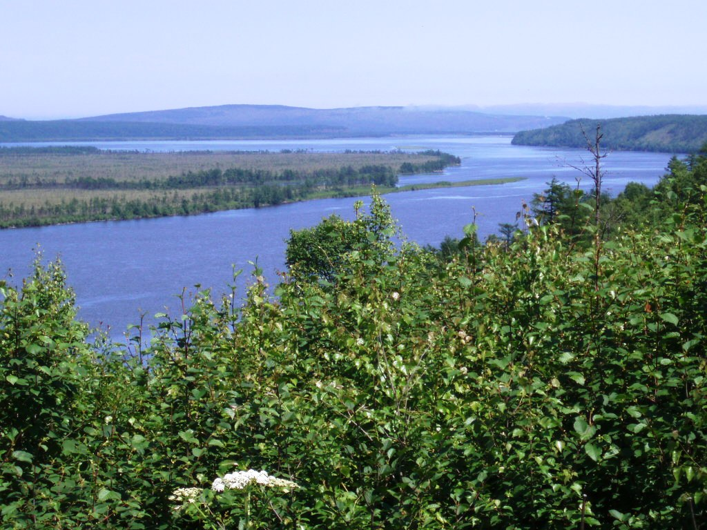 Тумнин